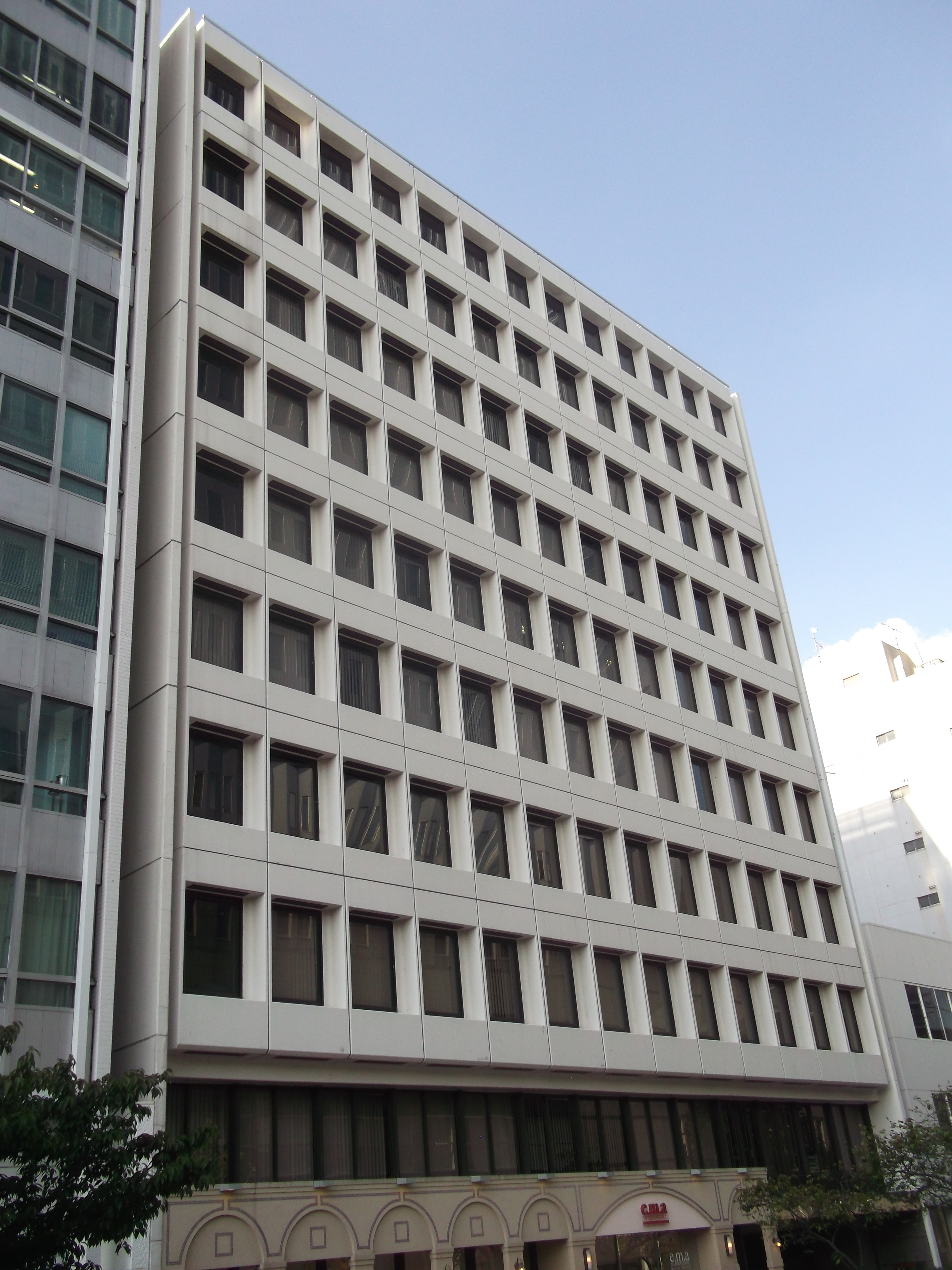 名古屋市東区東桜のENEOSウィング本社が入居する一光パーク栄ビルを南側公道西側より撮影